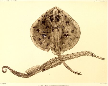 Старинное изображение (1880)